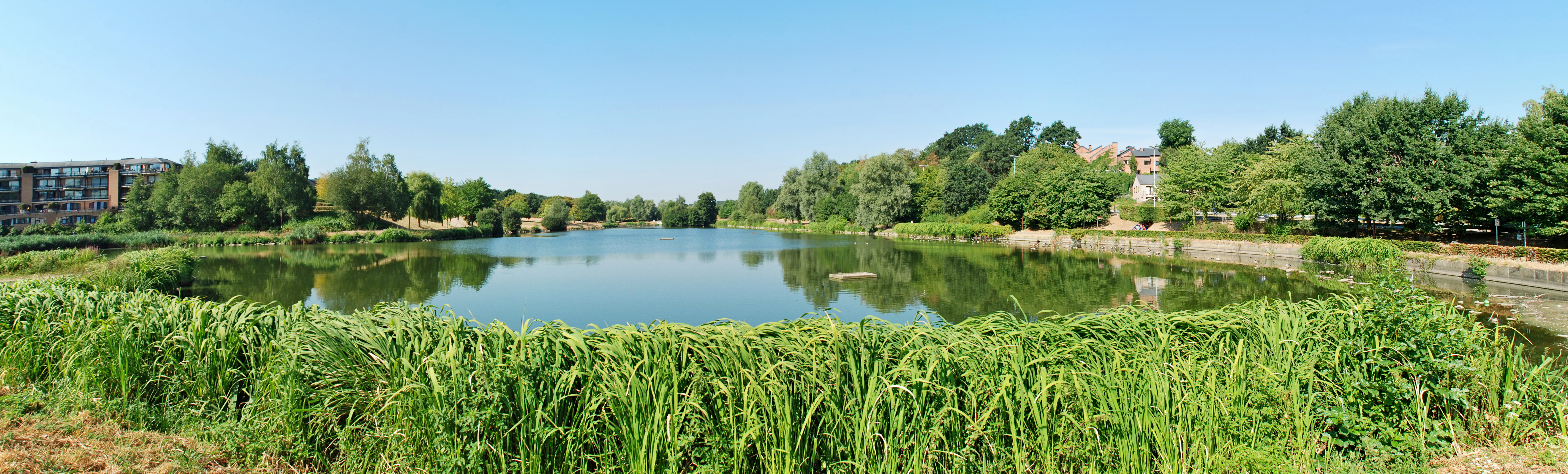 Belgique - Brabant wallon - Ottignies-Louvain-la-Neuve - Lac de Louvain-la-Neuve (lac artificiel aménagé en 1984) - photo panoramique